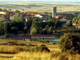 Mingorría. Vista desde la vía del ferrocarril. Septiembre de 2005. Fuente: Eugenio Vega, autor de parte del artículo sobre Mingorría. Copyright: libre de derechos.